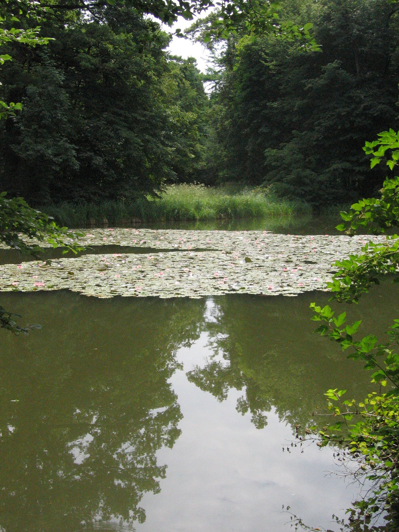 Kugelweiher im Schlosspark Nymphenburg, Muenchen